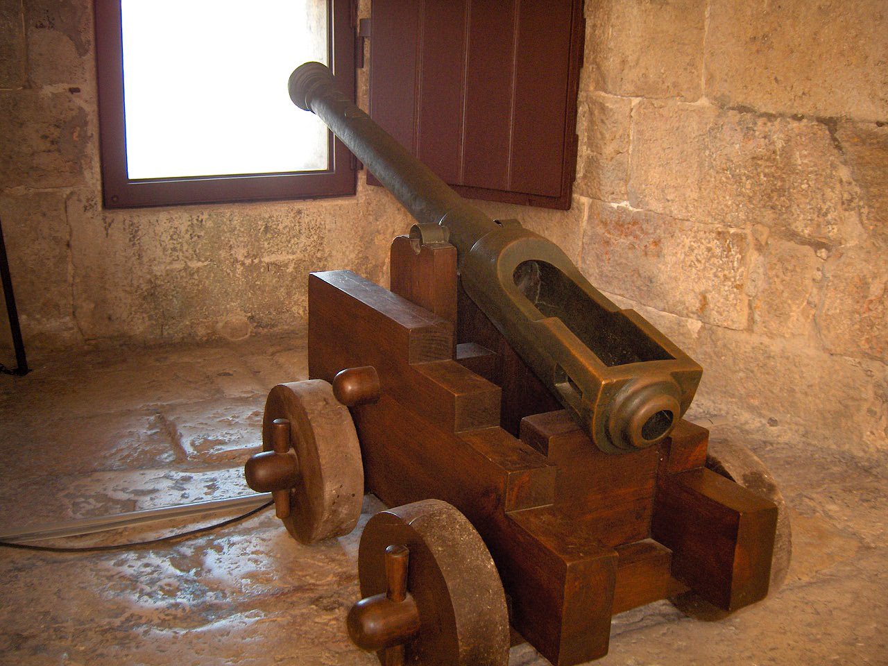 Torre de Belém ,Belém (Lisbon), Portugal